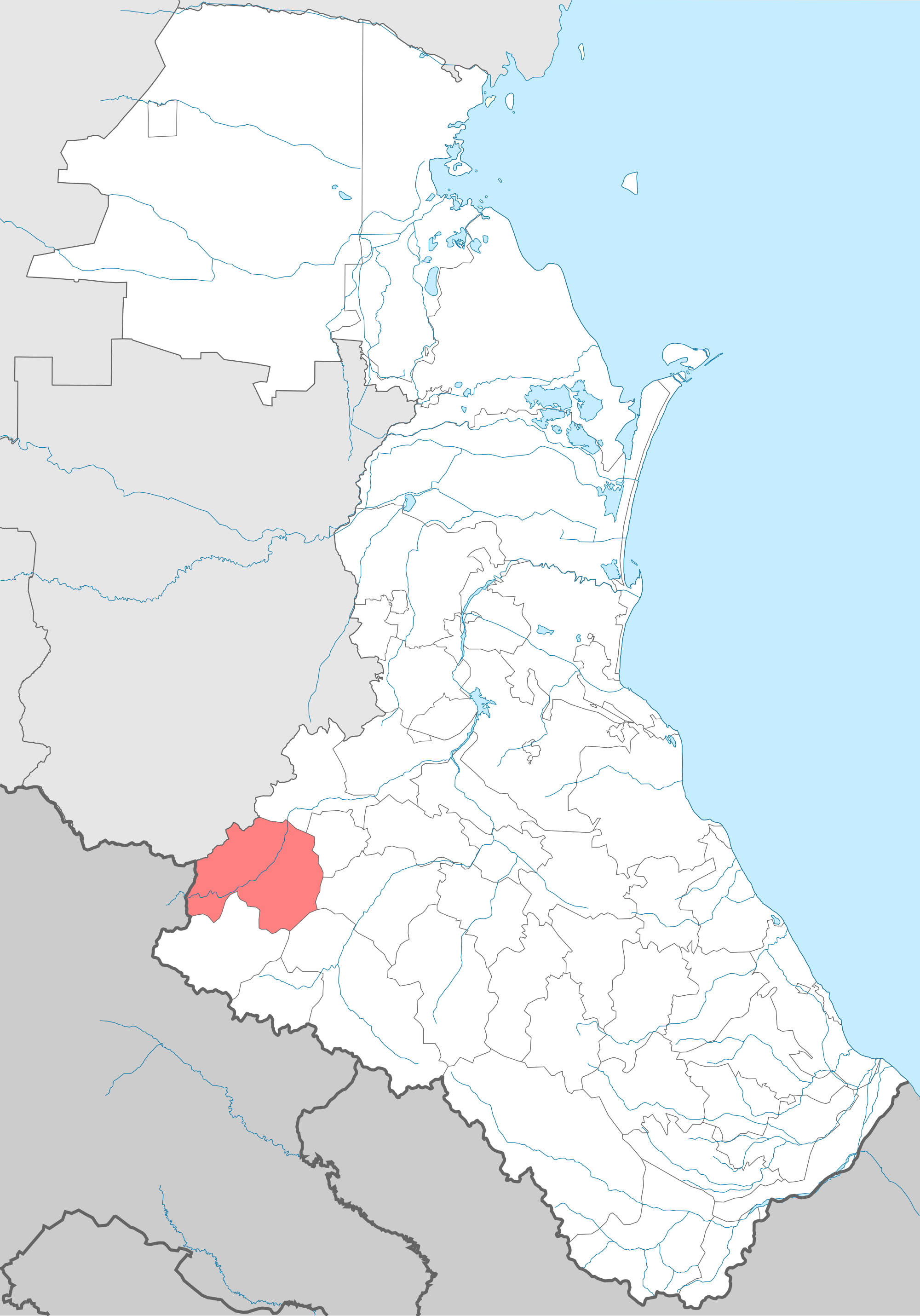 Tsumadan piiri Dagestanin kartalla.